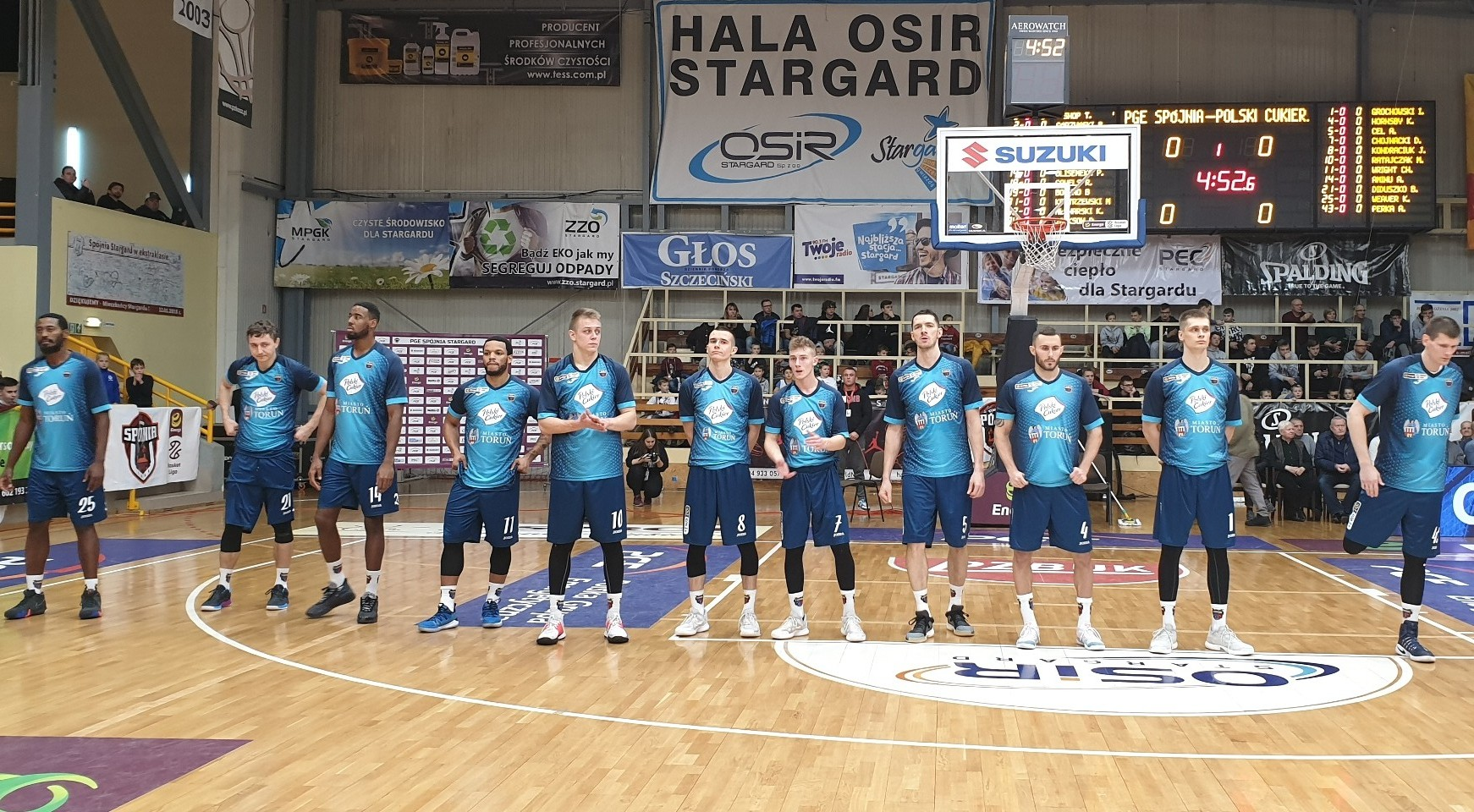 Stargard. Zespół Polski Cukier Toruń